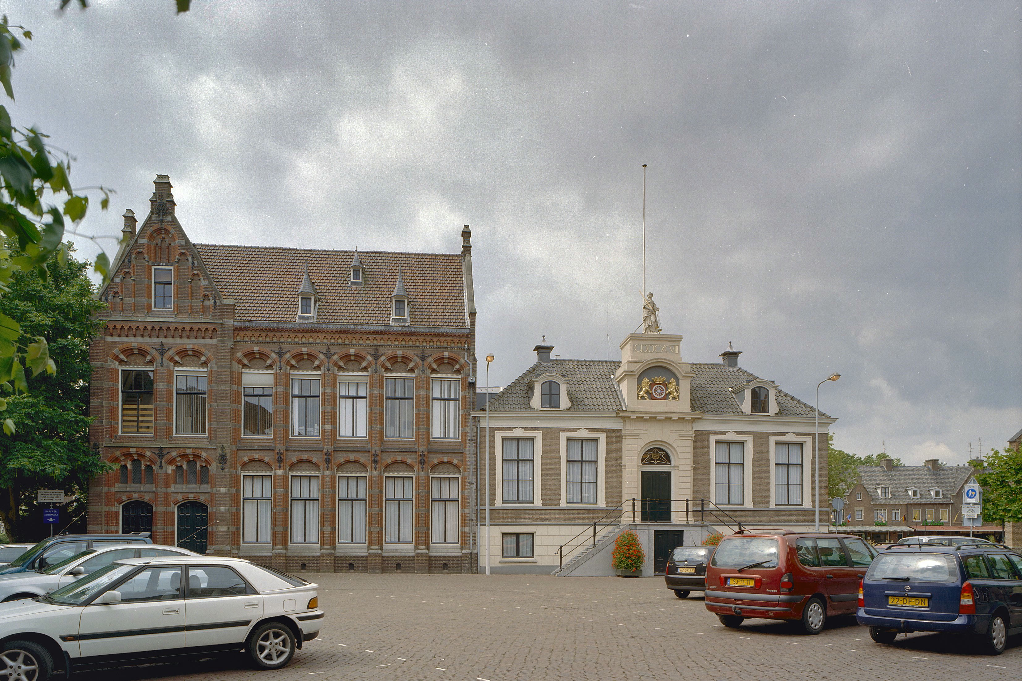 Stadhuis: Overzicht voorgevels (opmerking: Gefotografeerd voor Toonbeelden van de Wederopbouw)